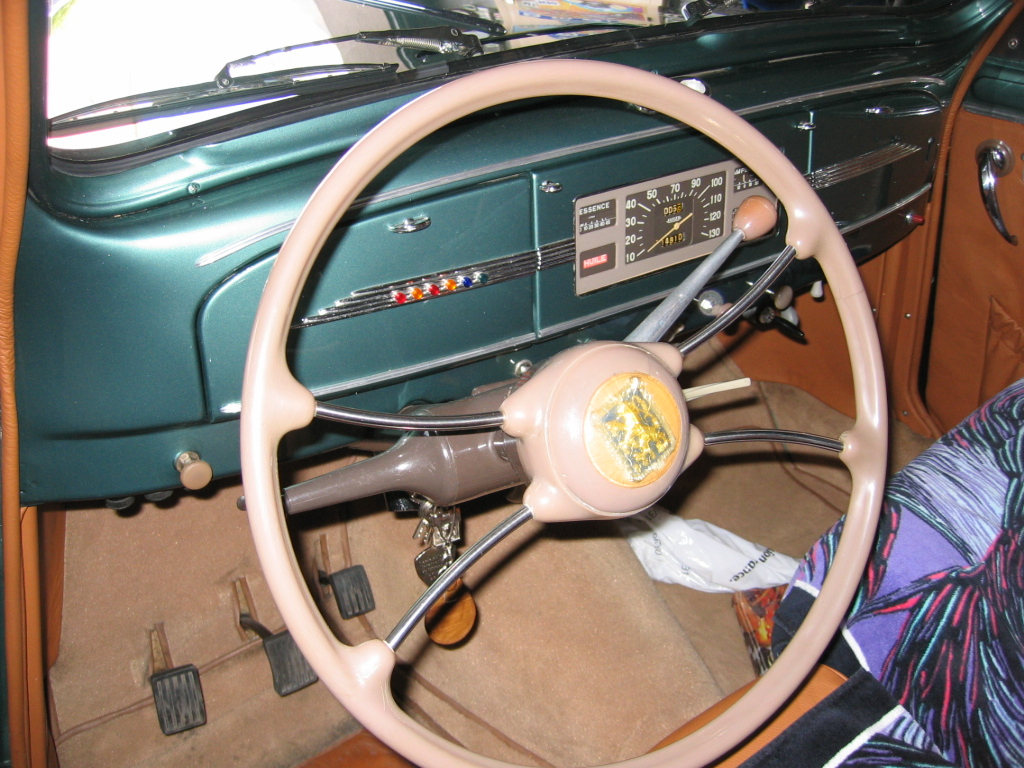 Peugeot 203 coupé cabriolet de Bernard Beucler - 25420 Bart - Franche Comté